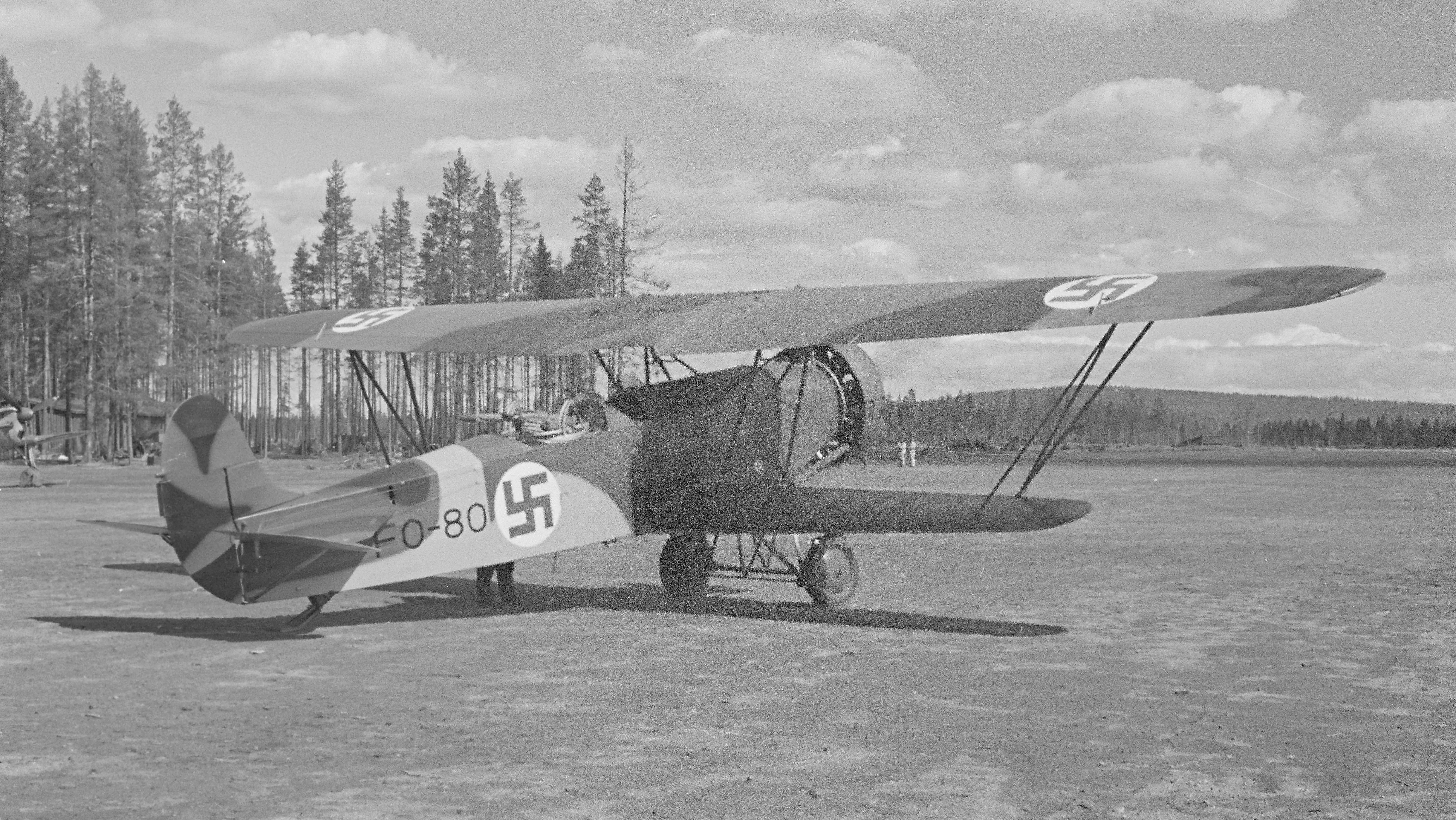 Ryssältä vallattu tiedustelukone palvelemassa uusia isäntiä. (Kuvassa Fokker C.VE (FO-80). Ruotsi lahjoitti kolme Fokker C.VE -konetta Suomelle talvisodan sytyttyä). Kuvauspaikka: Tiiksjärvi